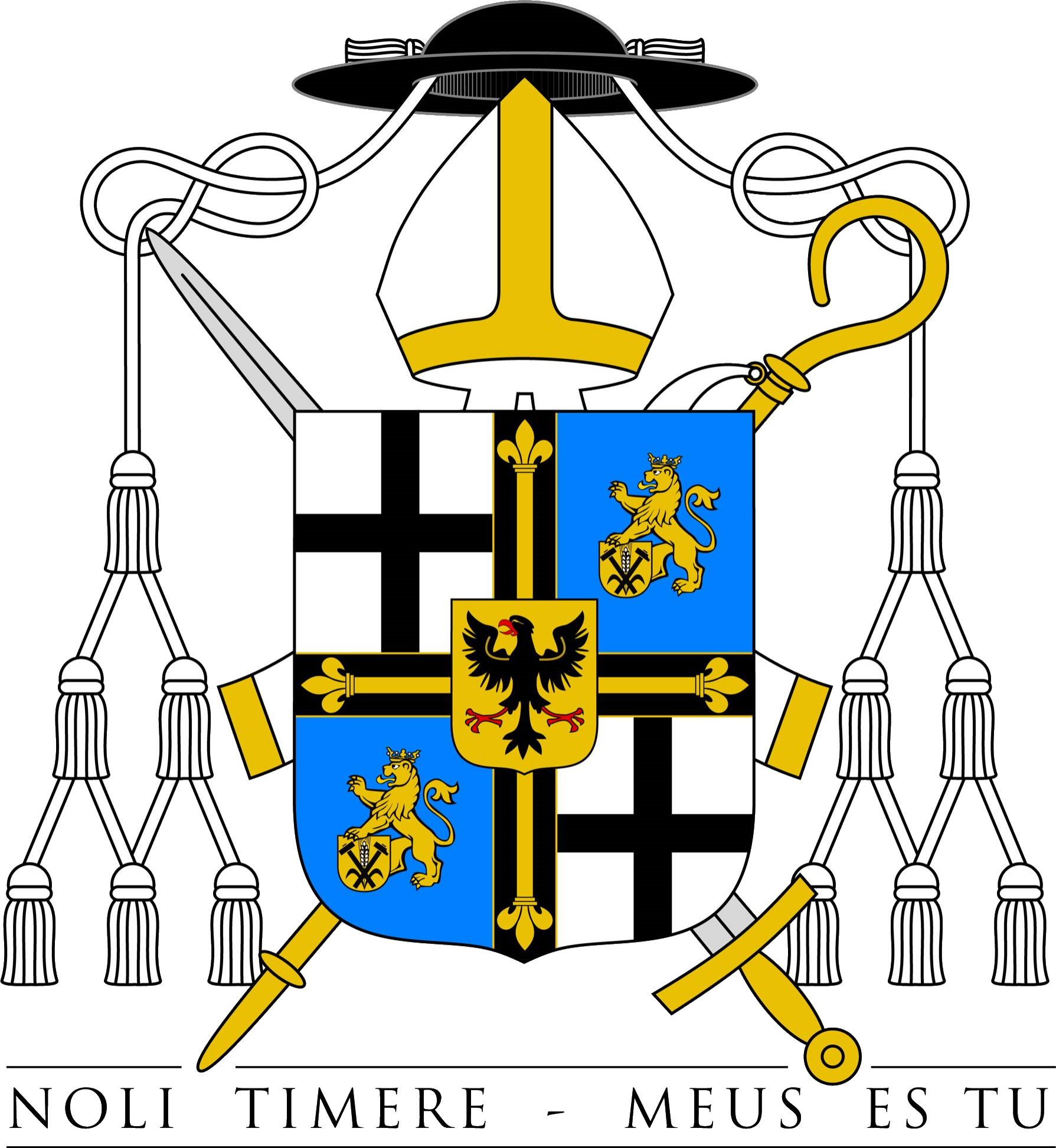 Wappen des Hochmeisters Frank Bayard